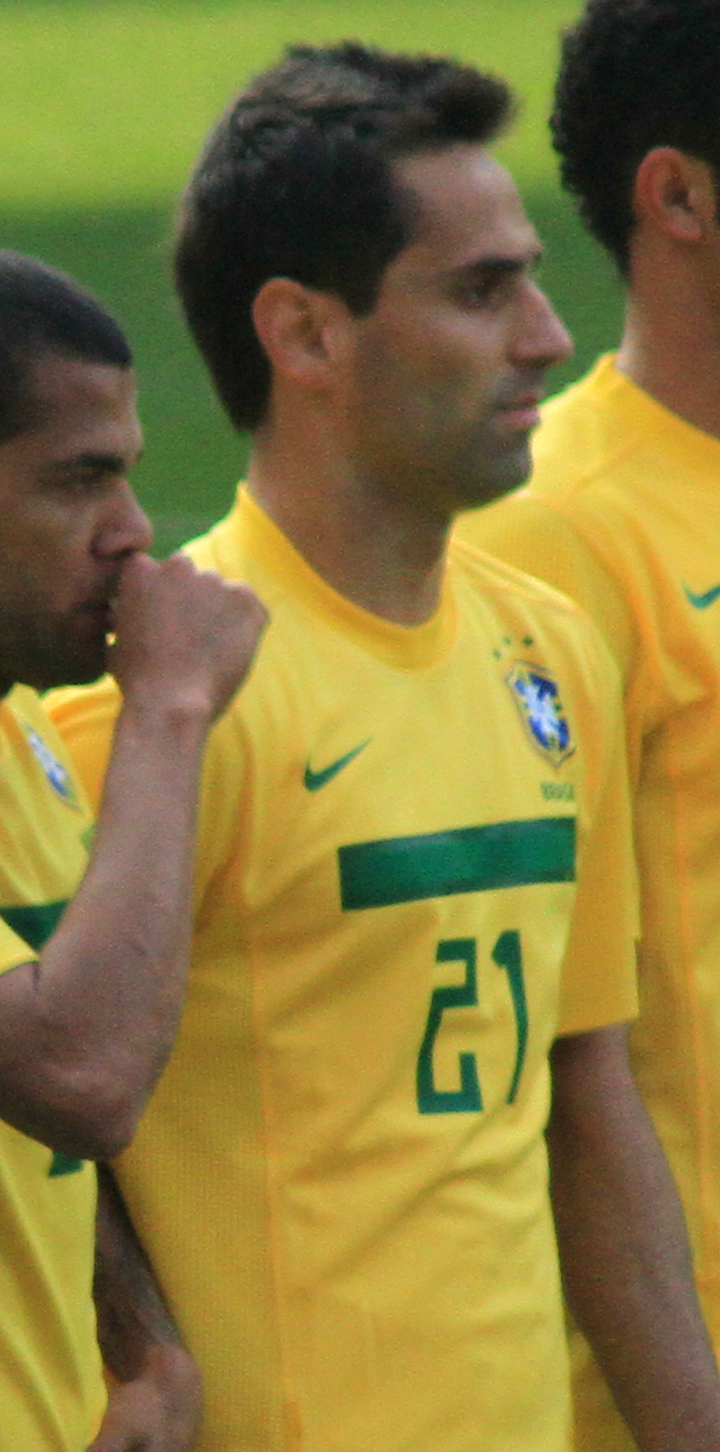 Jonas Gonçalves Oliveira from Brazil vs Scotland